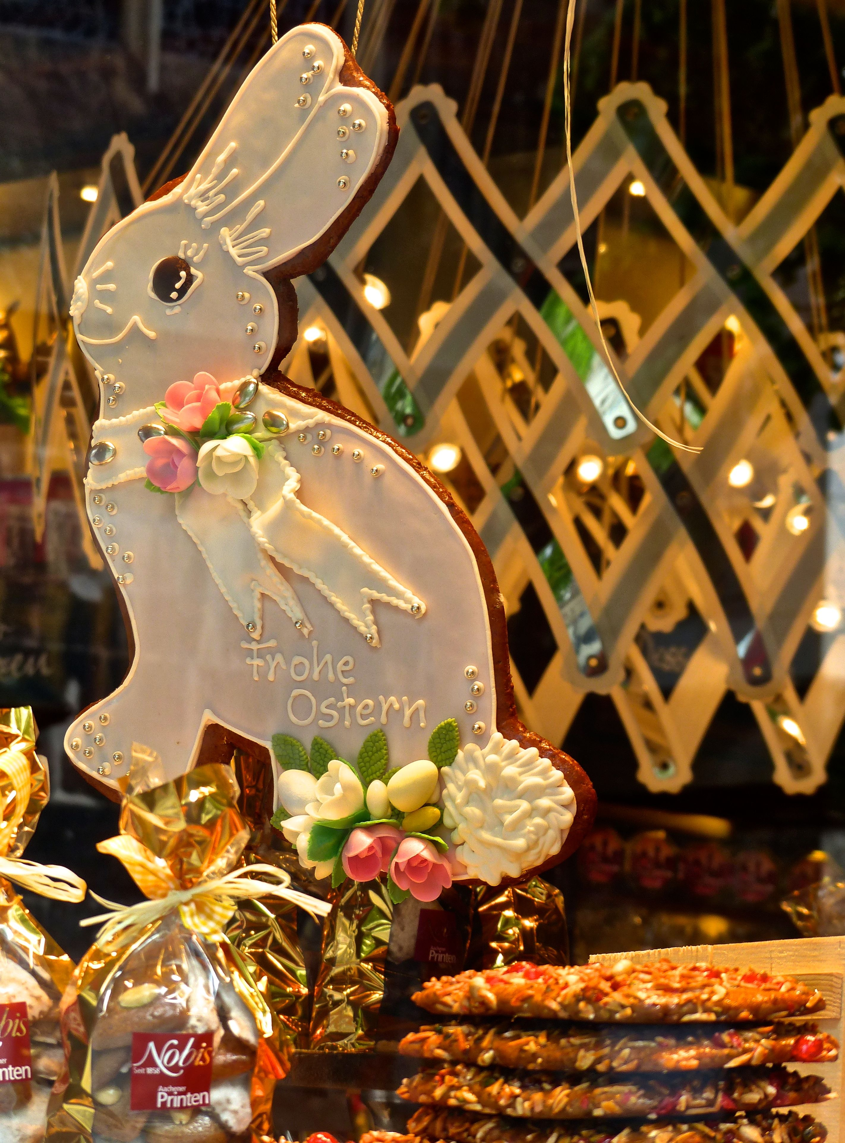 Osterndekoration aus Printen , Aachen 2014